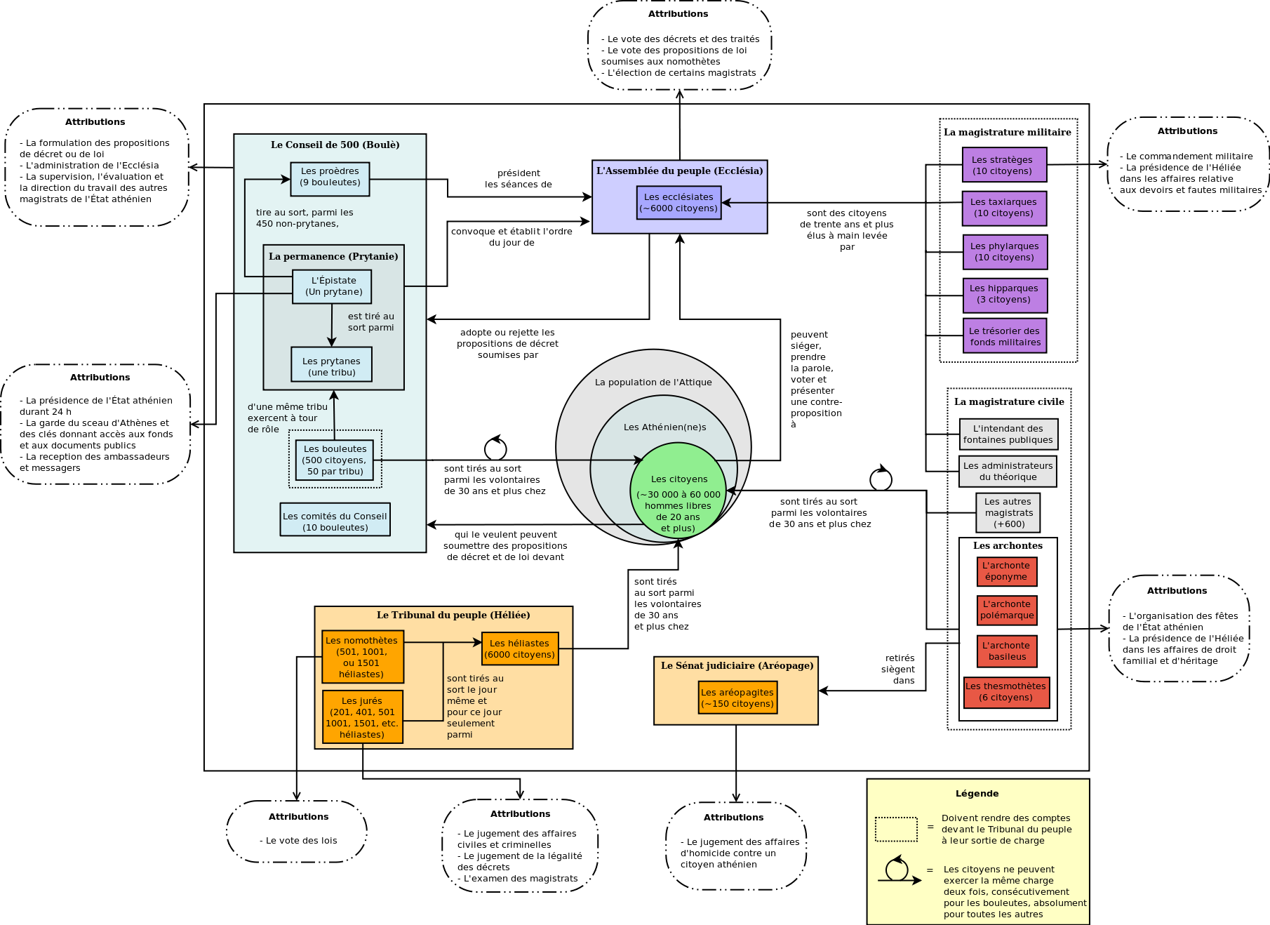 Diagramme représentant la constitution des Athéniens au IVe siècle. Les sources principales d'information utilisées pour la réalisation du diagramme sont : Mogens H. Hasens, La Démocratie athénienne à l'époque de Démosthène, Éditions Tallandier, 2009 Le Athênaíôn politeía attribué à Aristote, traduit en français par l'helléniste B. Haussoullier en 1891 et disponible en ligne sur le site L'antiquité grecque et latine de Philippe Remacle et cie. Le dossier « La citoyenneté à Athènes », projet Musagora de l'Educnet (France) Ce digramme a été réalisé avec le logiciel libre Dia version 0.97 pour GNOME.